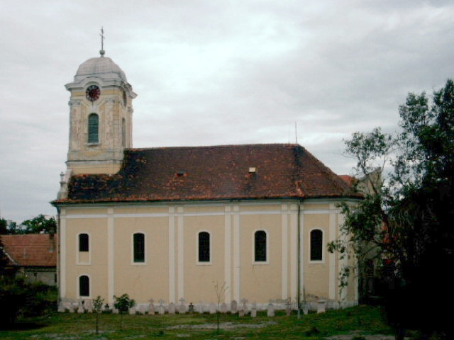 Serbisch-orthodoxe Kirche der Muttergottes in Komárno (SK).